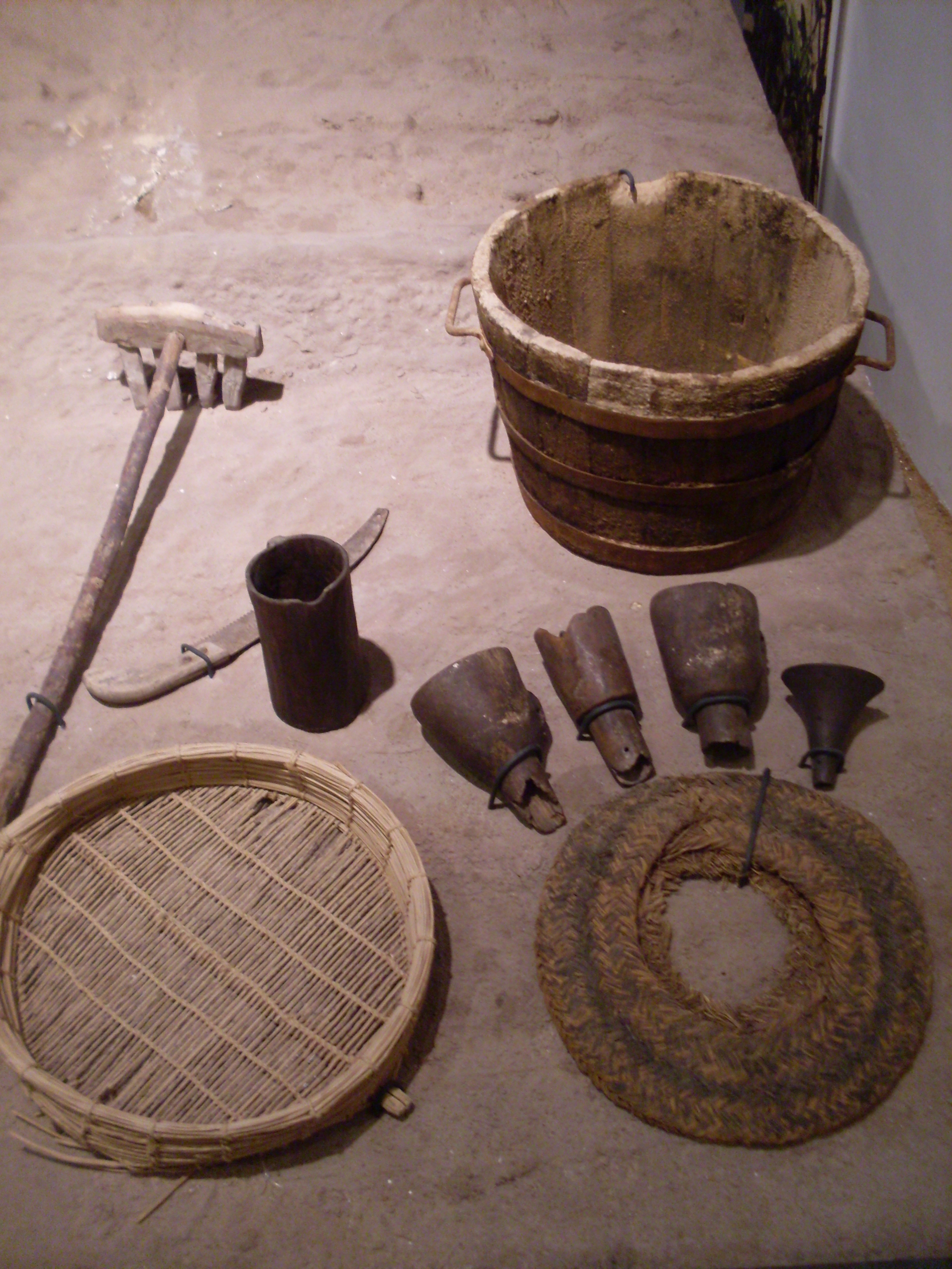 Musée du patrimoine traditionnel de Djerba, matériel de collecte des oliviers